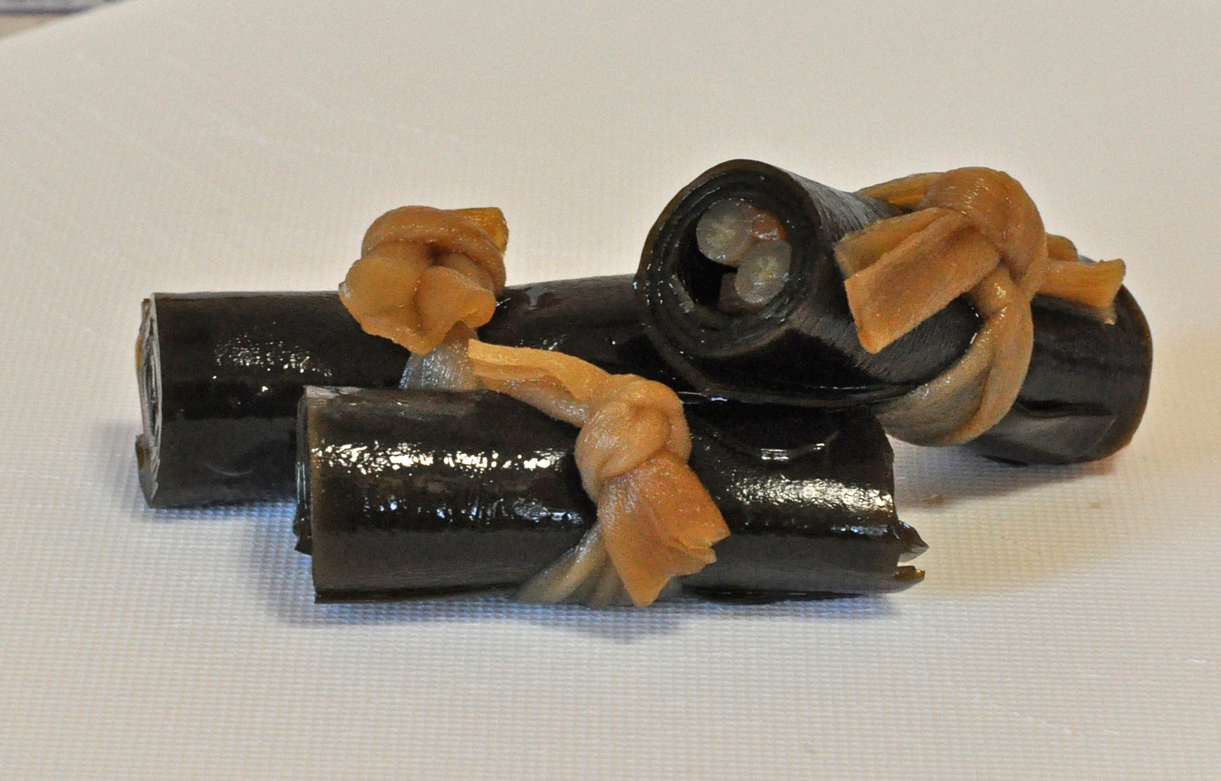 おせち料理の昆布巻